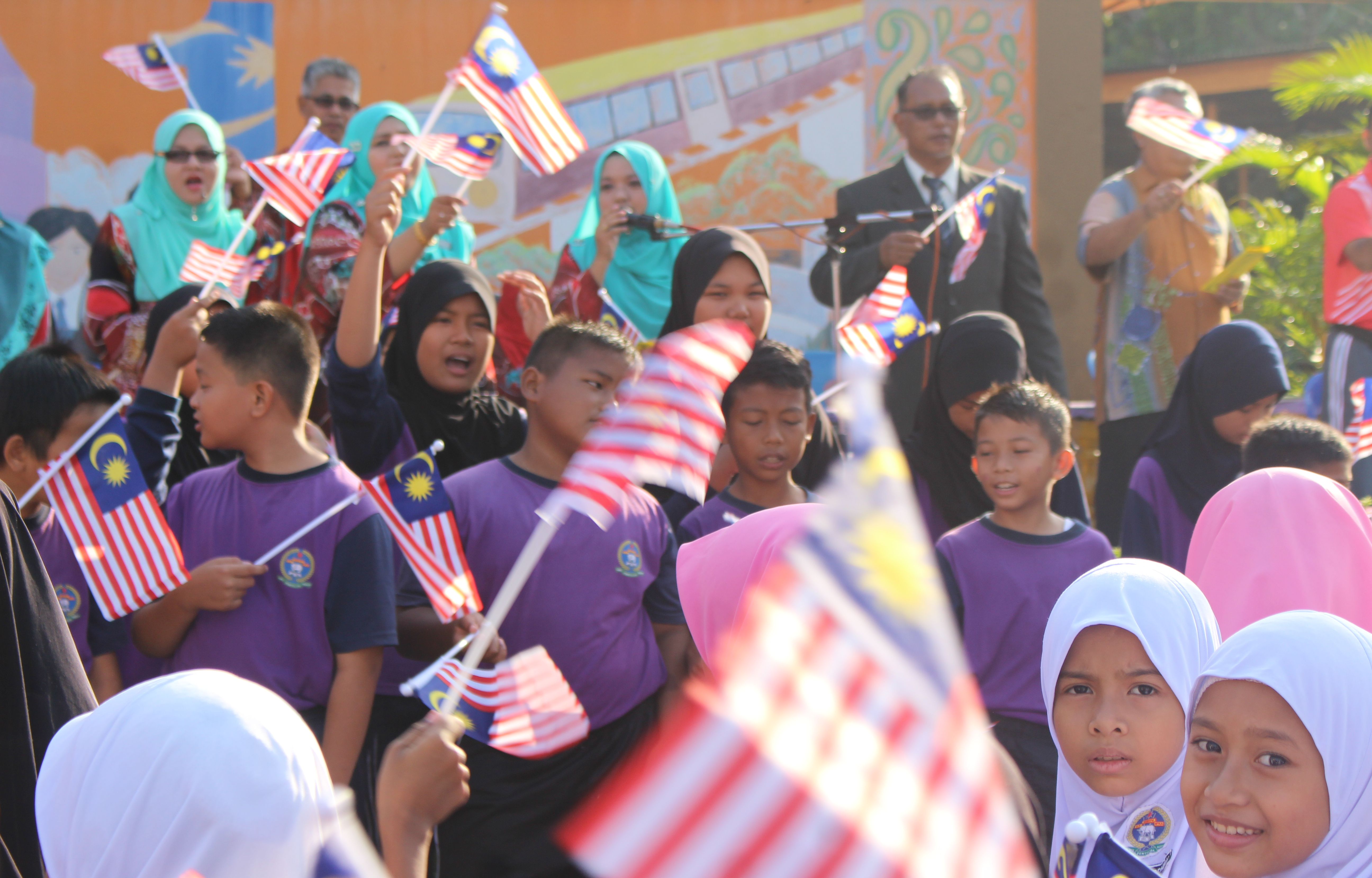 Kibaran Jalur Gemilang Oleh Murid-Murid Dengan Nyanyian Lagu Sehati Sejiwa